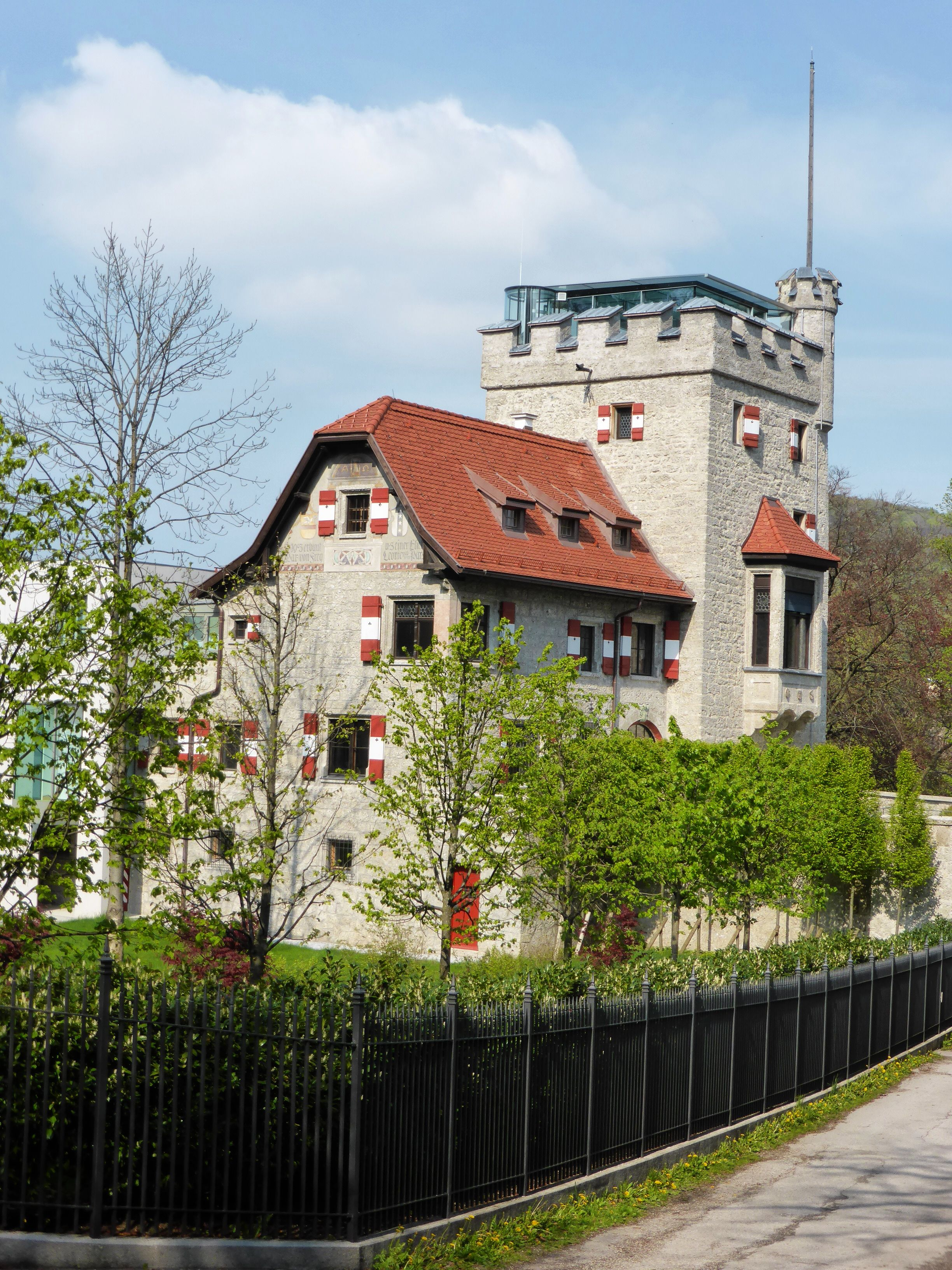 Freyschlössl